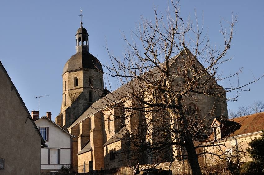 Eglise Notre-Dame d'Aigurande (Indre)